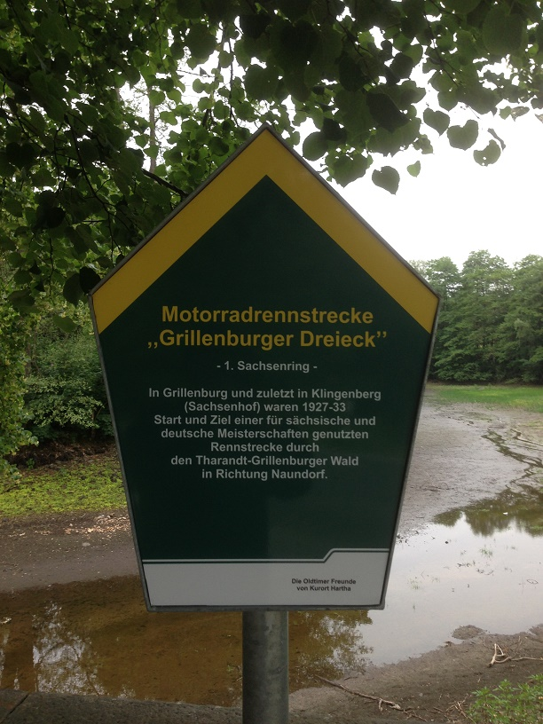 Gedenktafel Grillenburger Dreieck - 1. Sachsenring